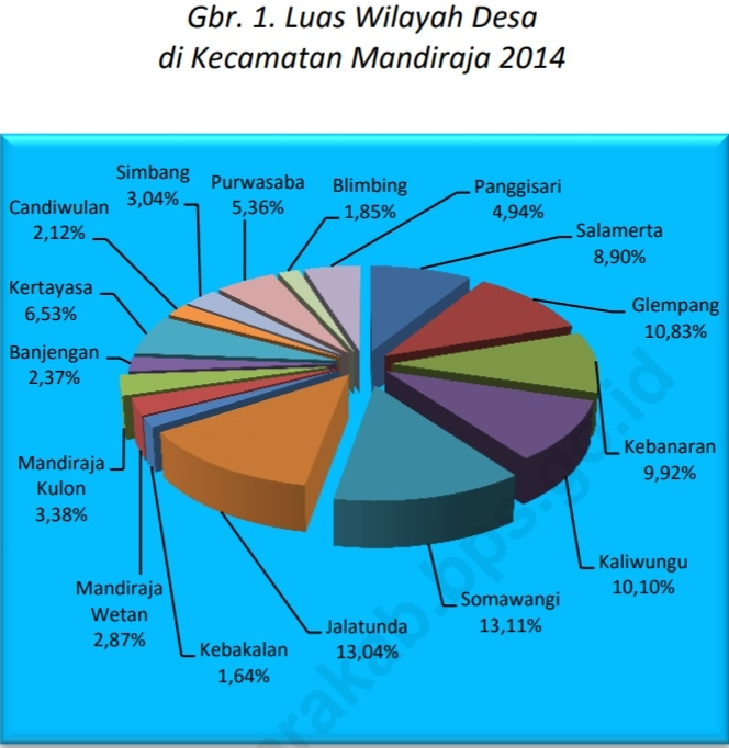 persentase luas desa